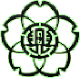 馬宮西小学校の校章